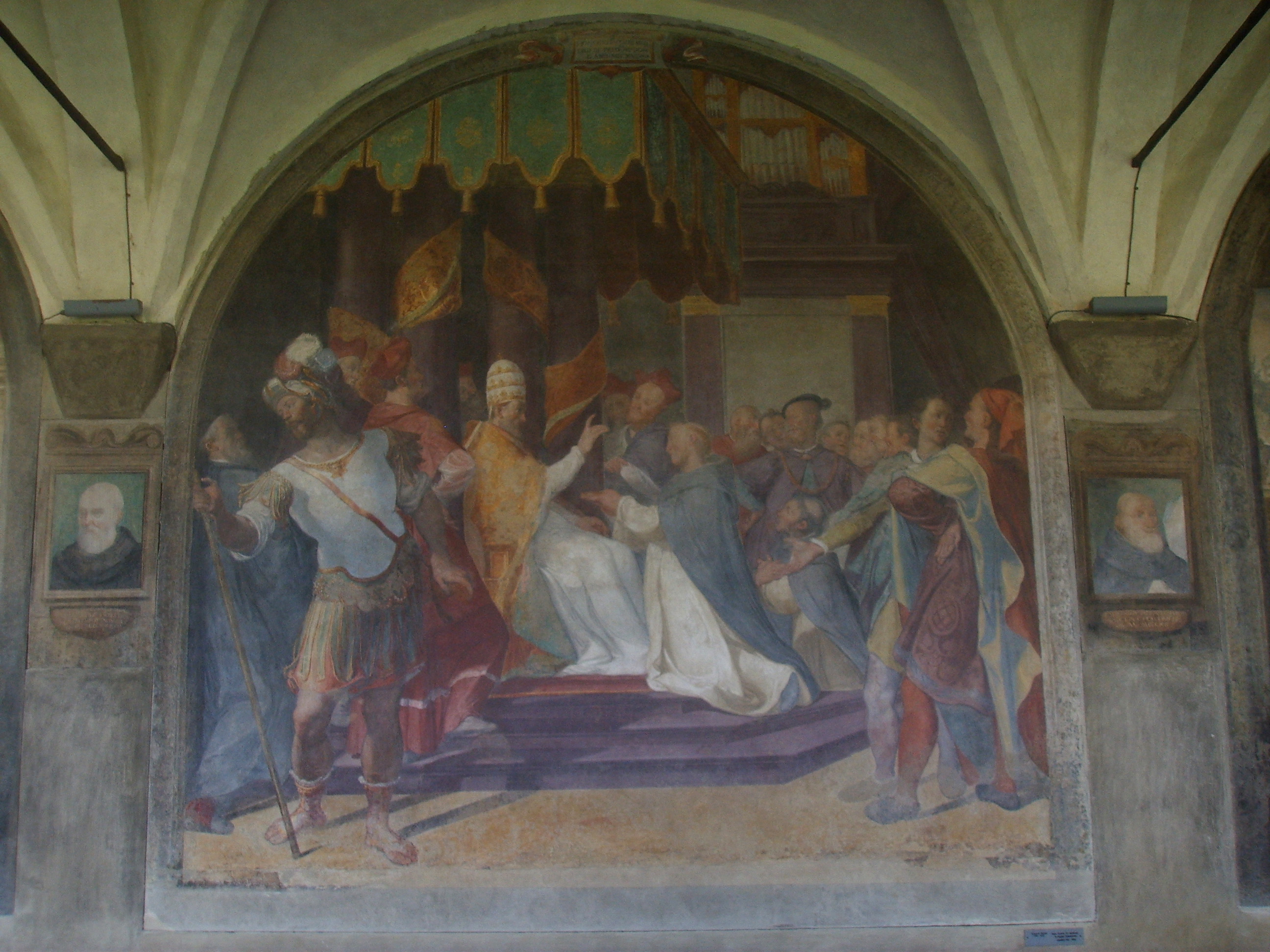 Gregorio Pagani, Papa Onorio III conferma la Regola domenicana. Chiostro Grande in Santa Maria Novella church fresco in Florence, Italy